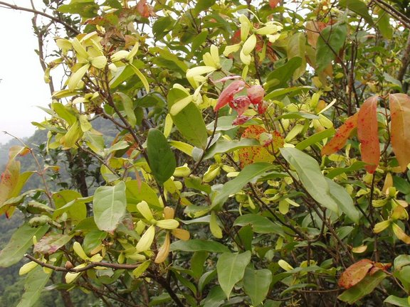 猿尾藤 螺旋槳狀翅果